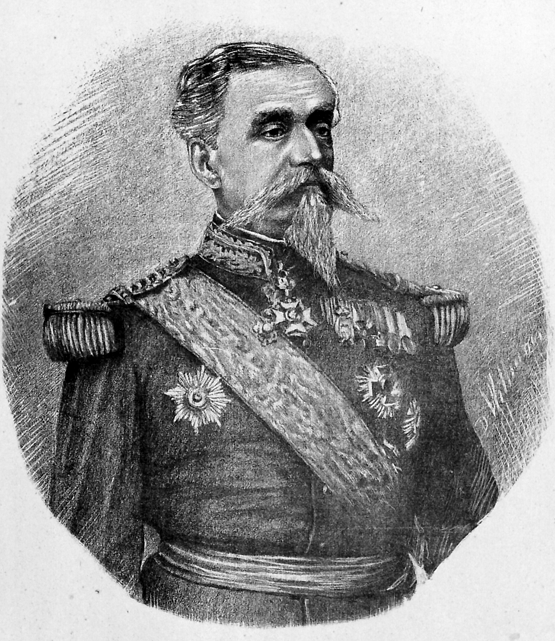 Portraits contemporains avec autographes : Politique, armée, clergé, letters, théatres & arts dessines & lithographies par D. William Bukarest, 1881 Le Général Floresco - Ancien Président du Conseil